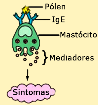 Resposta de mastócito com IgE sensível ao pólen.